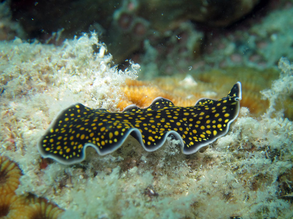 Thysanozoon nigropapillosum, Koh Phangan, Tailandia